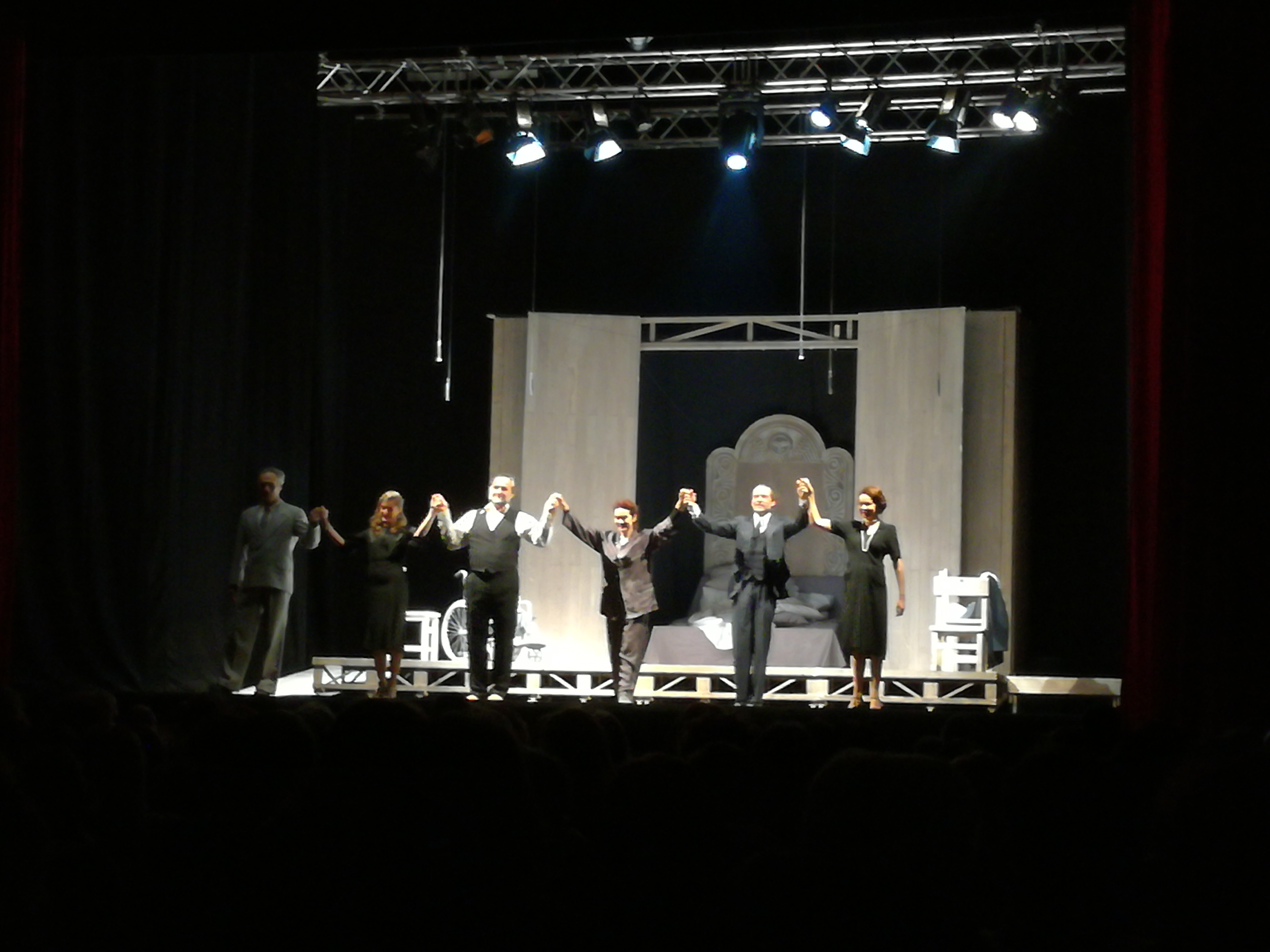 Laura Morante e altri attori nello spettacolo Locandiera B&B (archivio), presso San Nicolò a Tordino (Teramo).